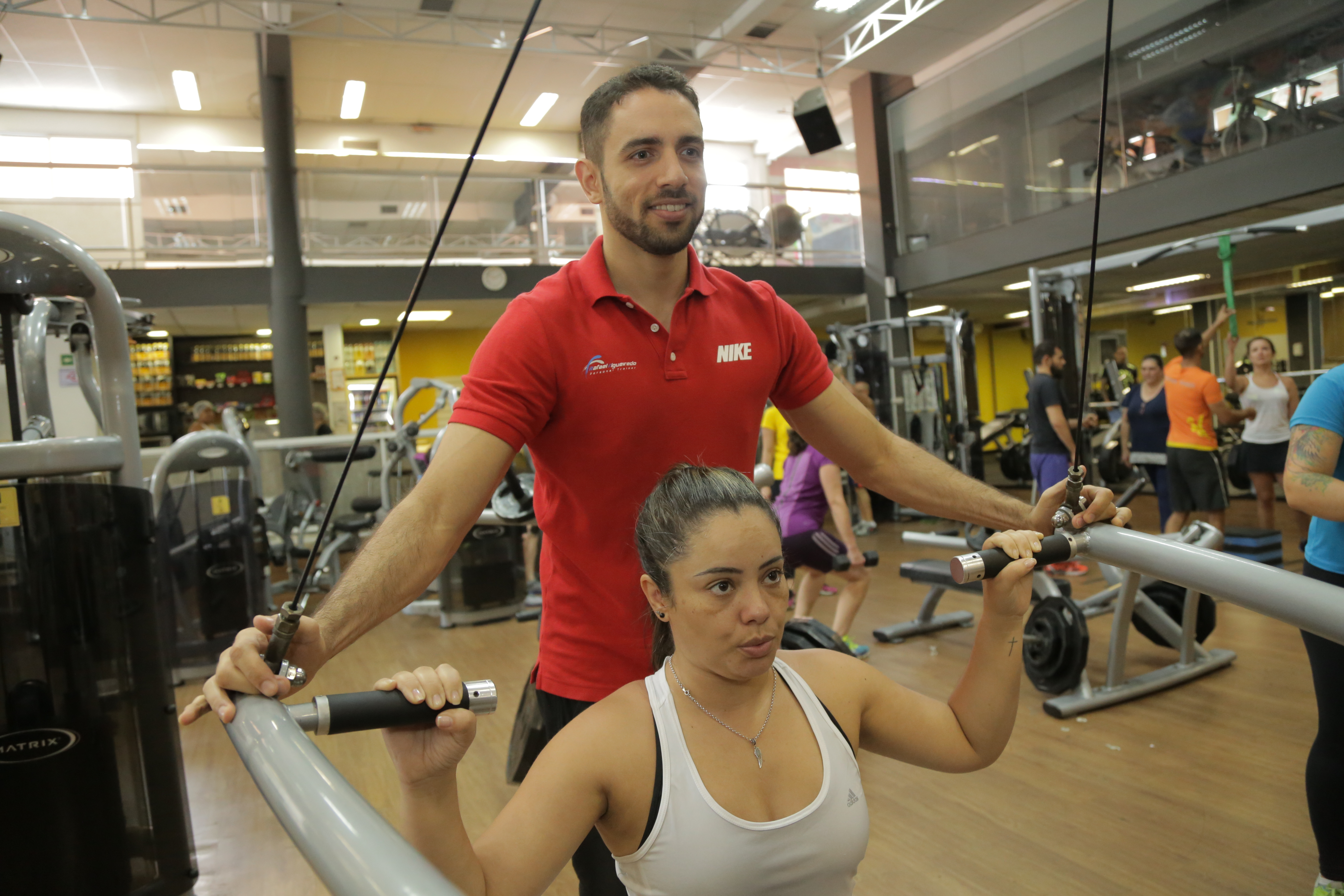 Personal